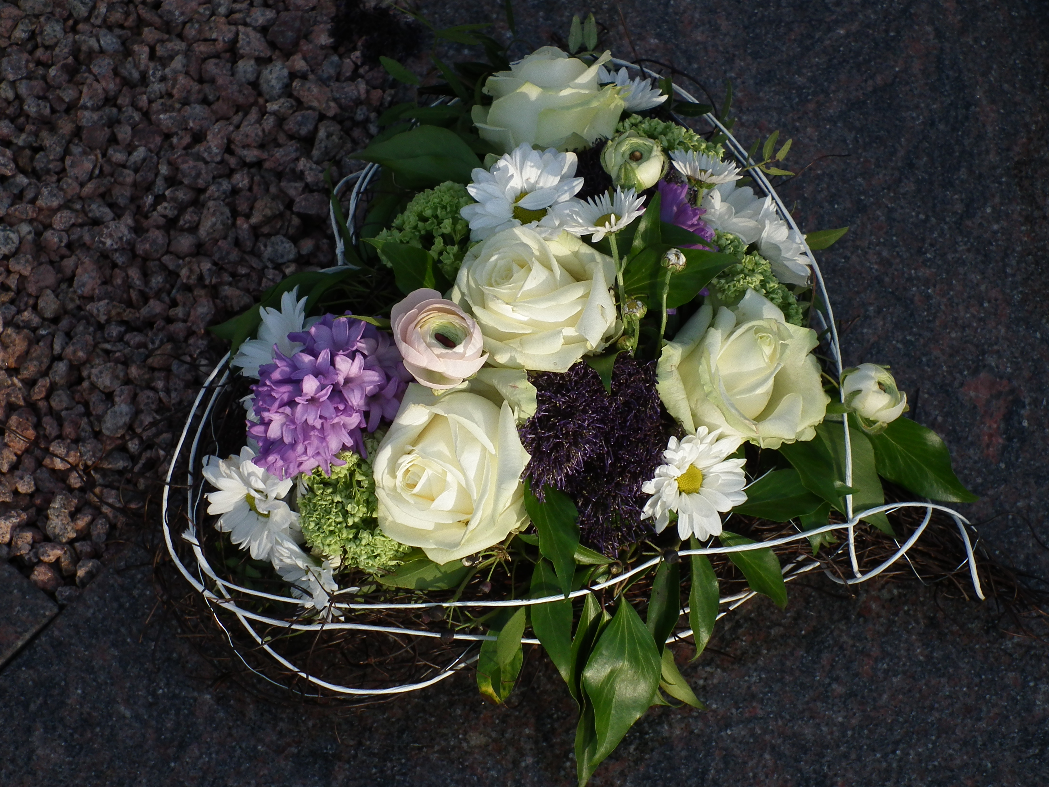 Grabschmuck in Herzform